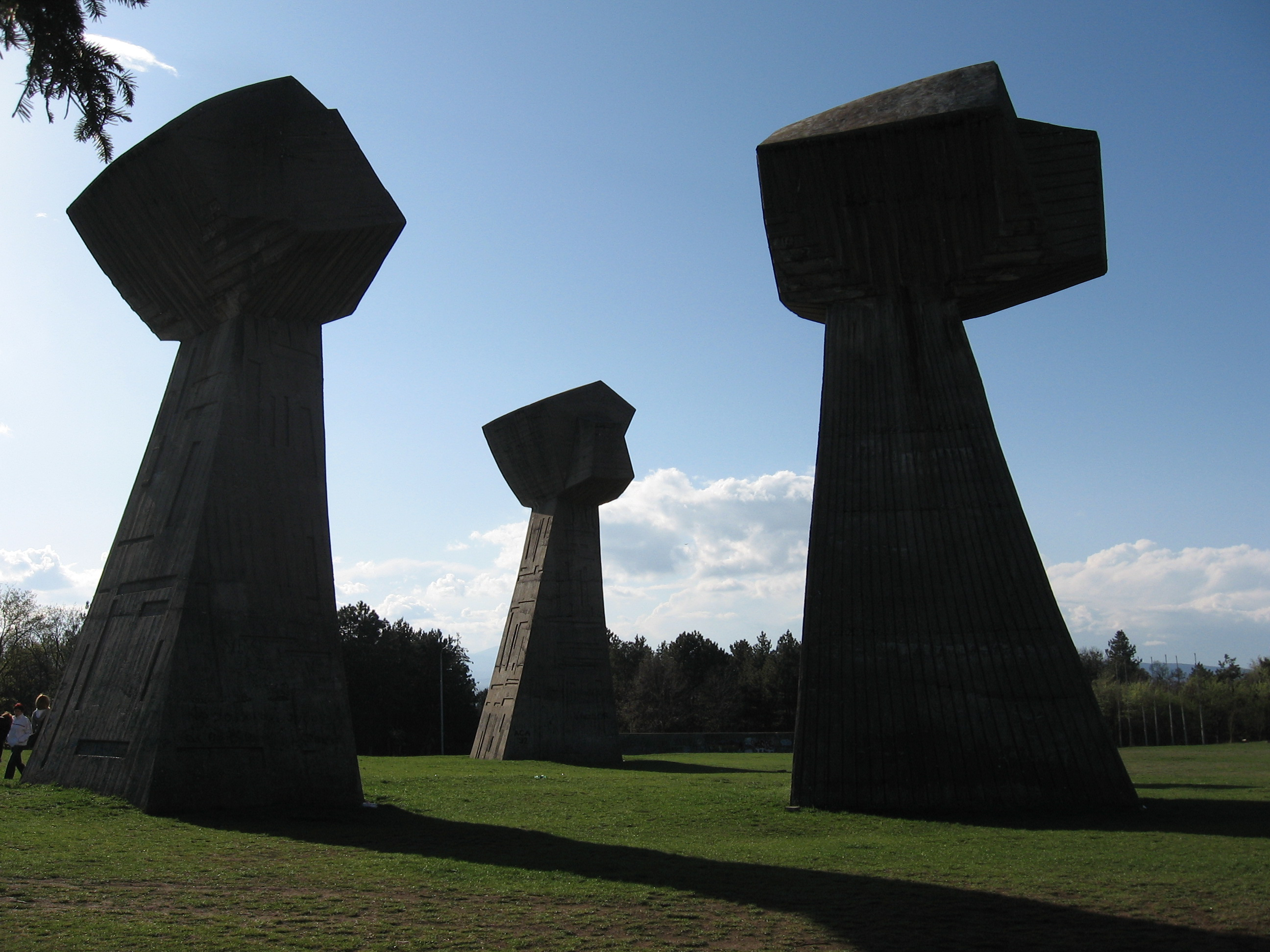 Песнице